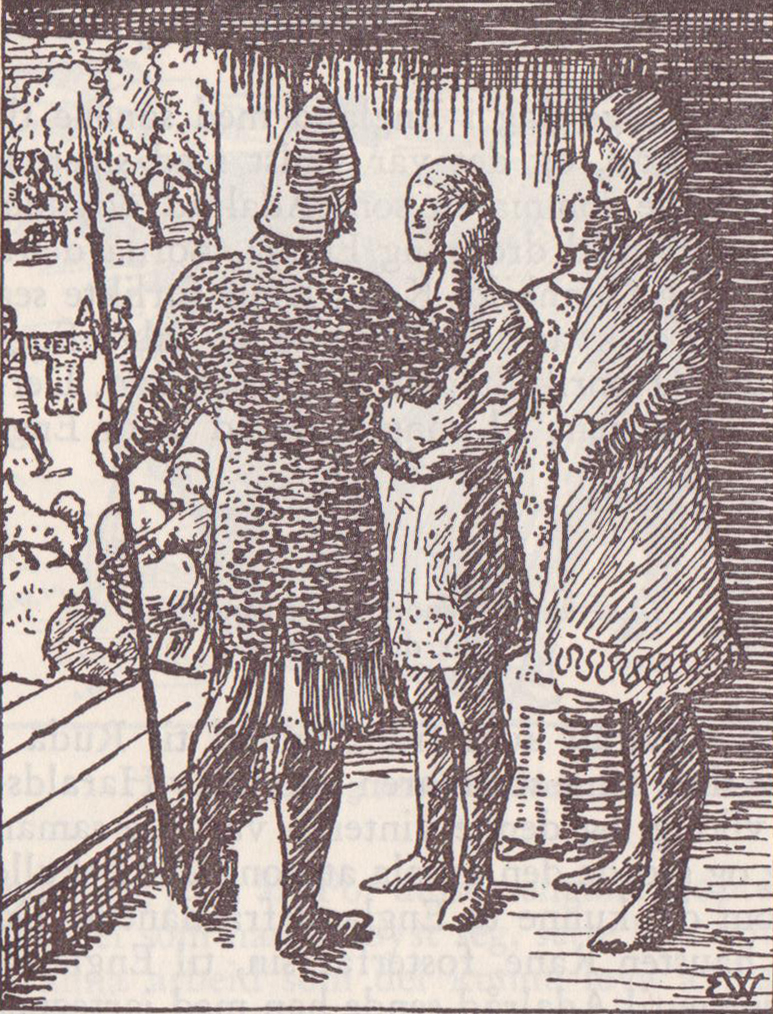 Eirik jarl tar farvel med sin sønn Håkon. Fra Olav den helliges saga.